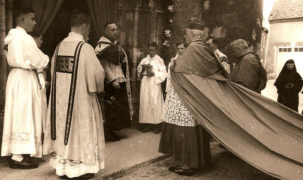 Visite pastorale de la paroisse de Désertines (Allier-France) par Mgr Georges Jacquin, évêque de Moulins (1942-1956) L'abbé Roger Chardonnet, doyen de Désertines, reçoit l'évêque à la porte de l'église Saint-Georges. Mgr Jacquin est assisté de Mgr Jean Chacaton, vicaire général et doyen du chapitre cathédral de Notre-Dame de Moulins. Collection personnelle